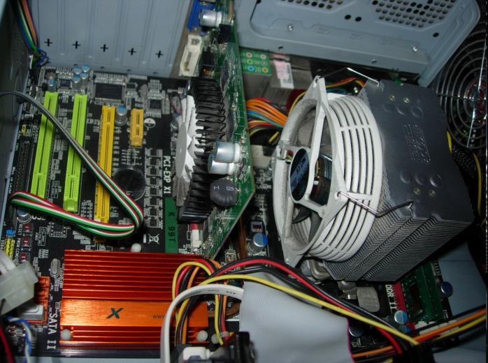 中文（中国大陆）: 显卡、CPU与芯片组散热器